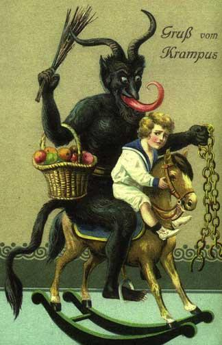 Gruß vom Krampus